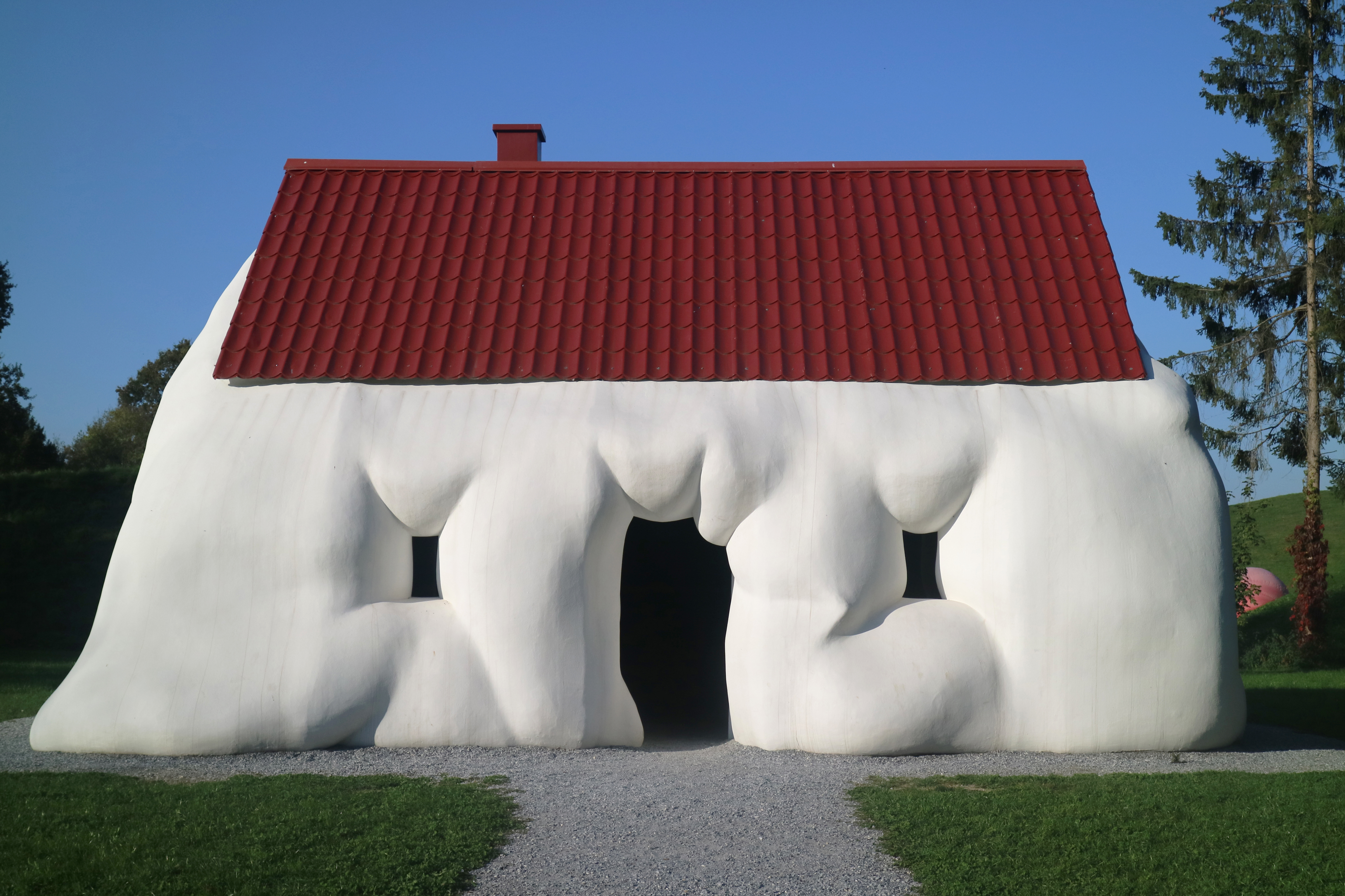 Erwin Wurm: Fat House (2003) im Österreichischen Skulpturenpark in der Gemeinde Premstätten, Steiermark